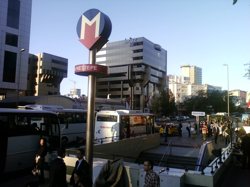 İstanbul metrosu, Gayrettepe girişi